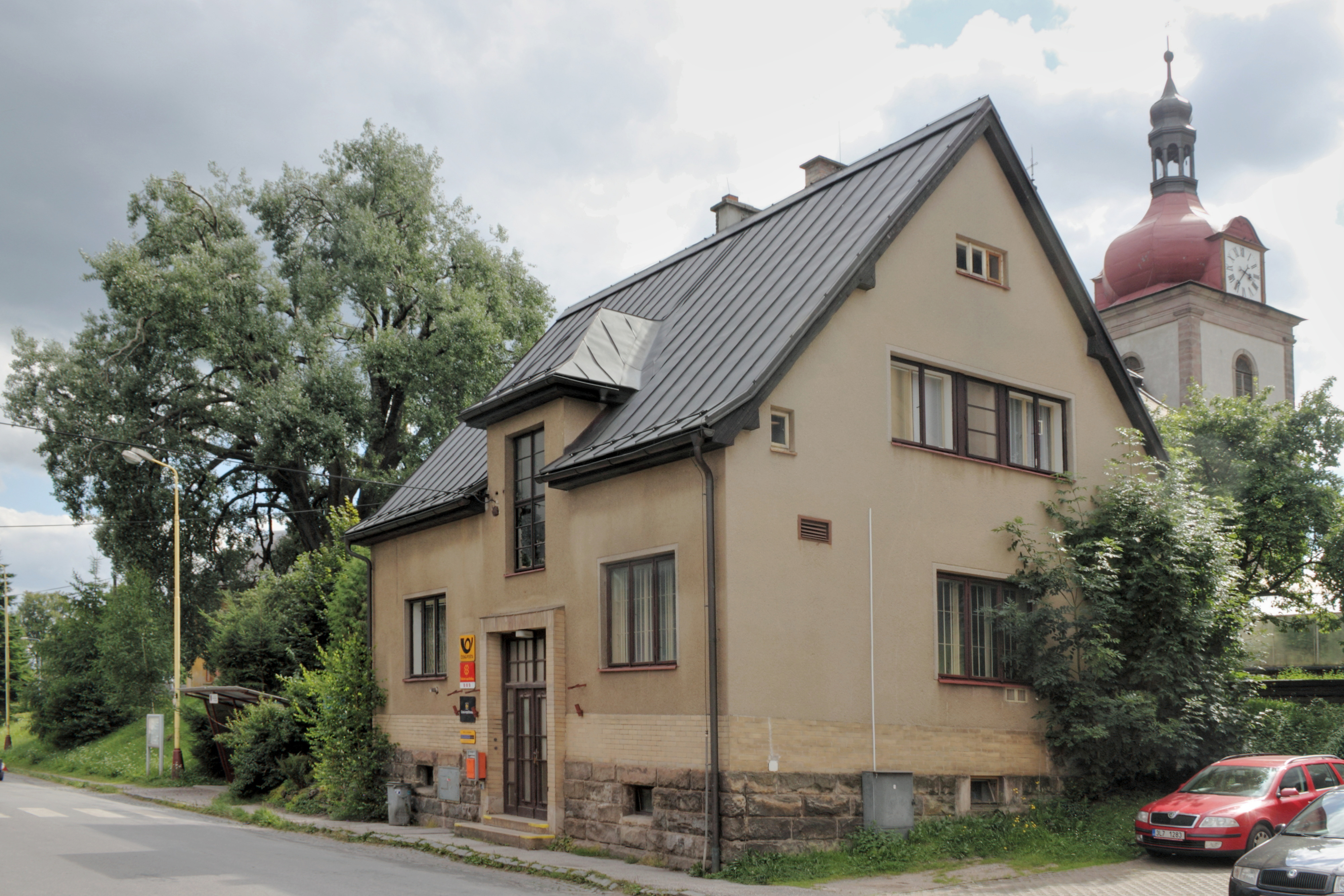 Pošta, Horní Branná